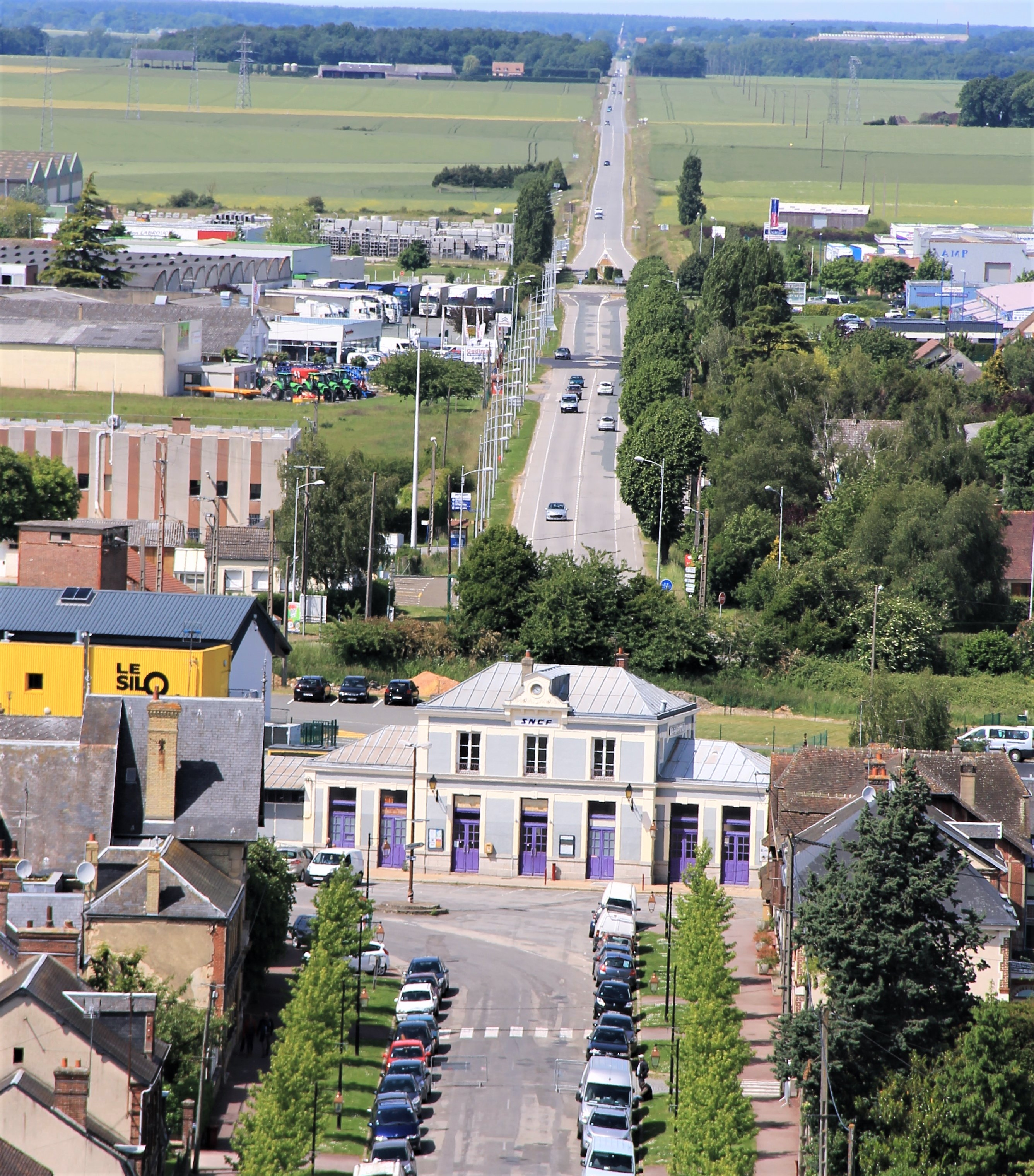 La gare de Verneuil-sur-Avre dans son environnement, vue depuis la tour de l'église de la Madeleine.